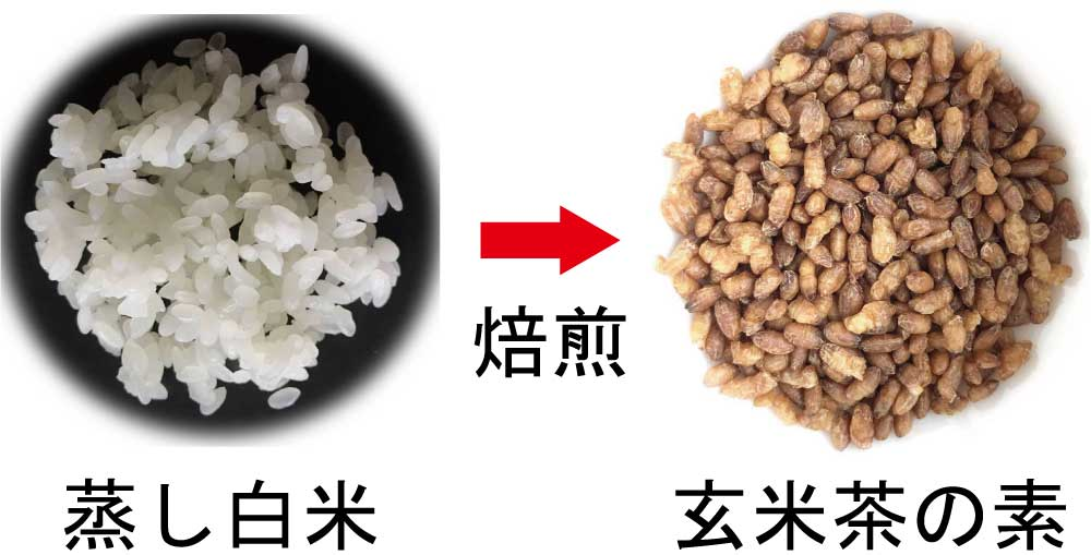 玄米茶の素は蒸し白米を焙煎したもので玄米茶の一原料である